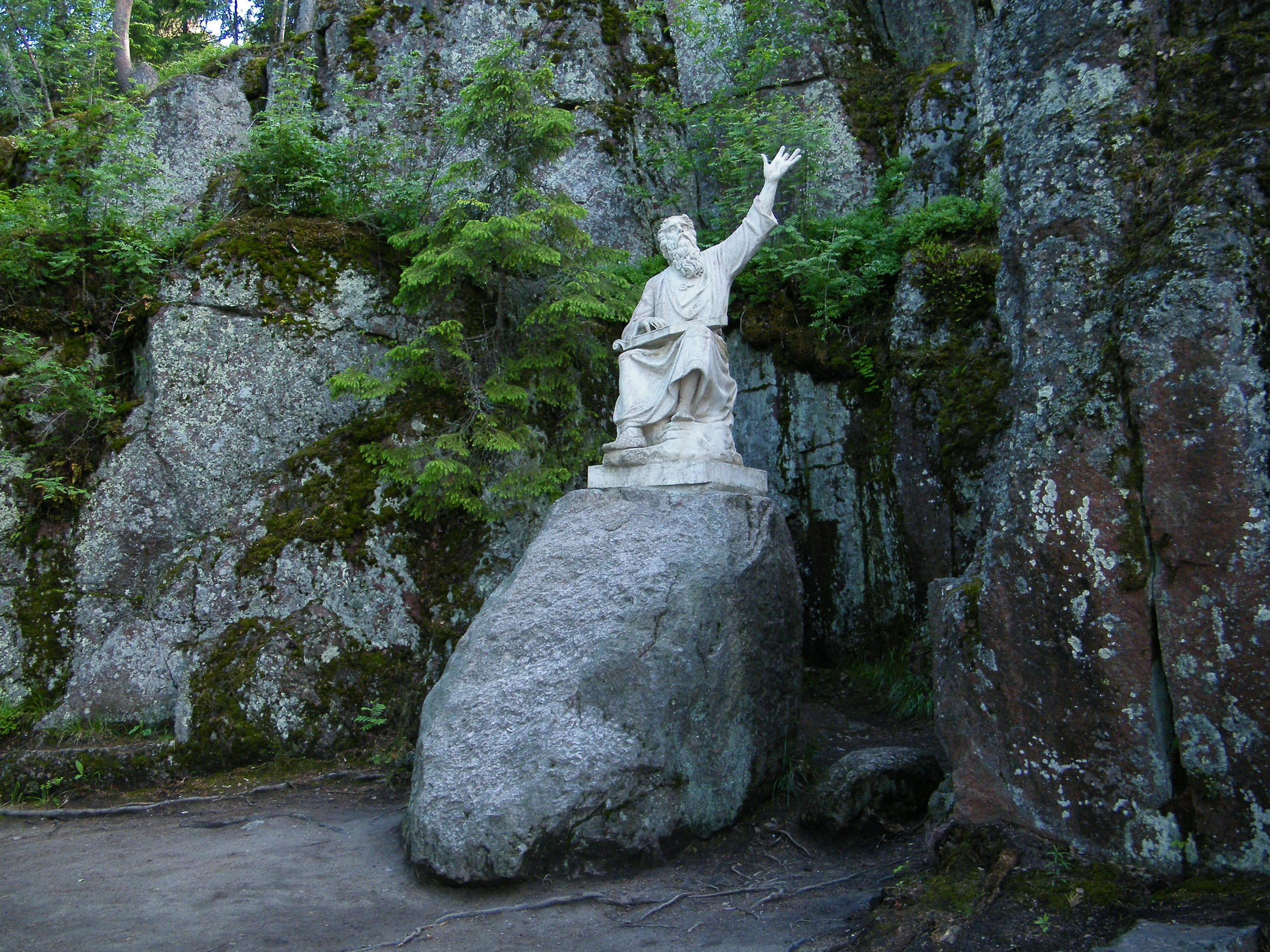 Статуя Вяйнямёйнена в парке Монрепо